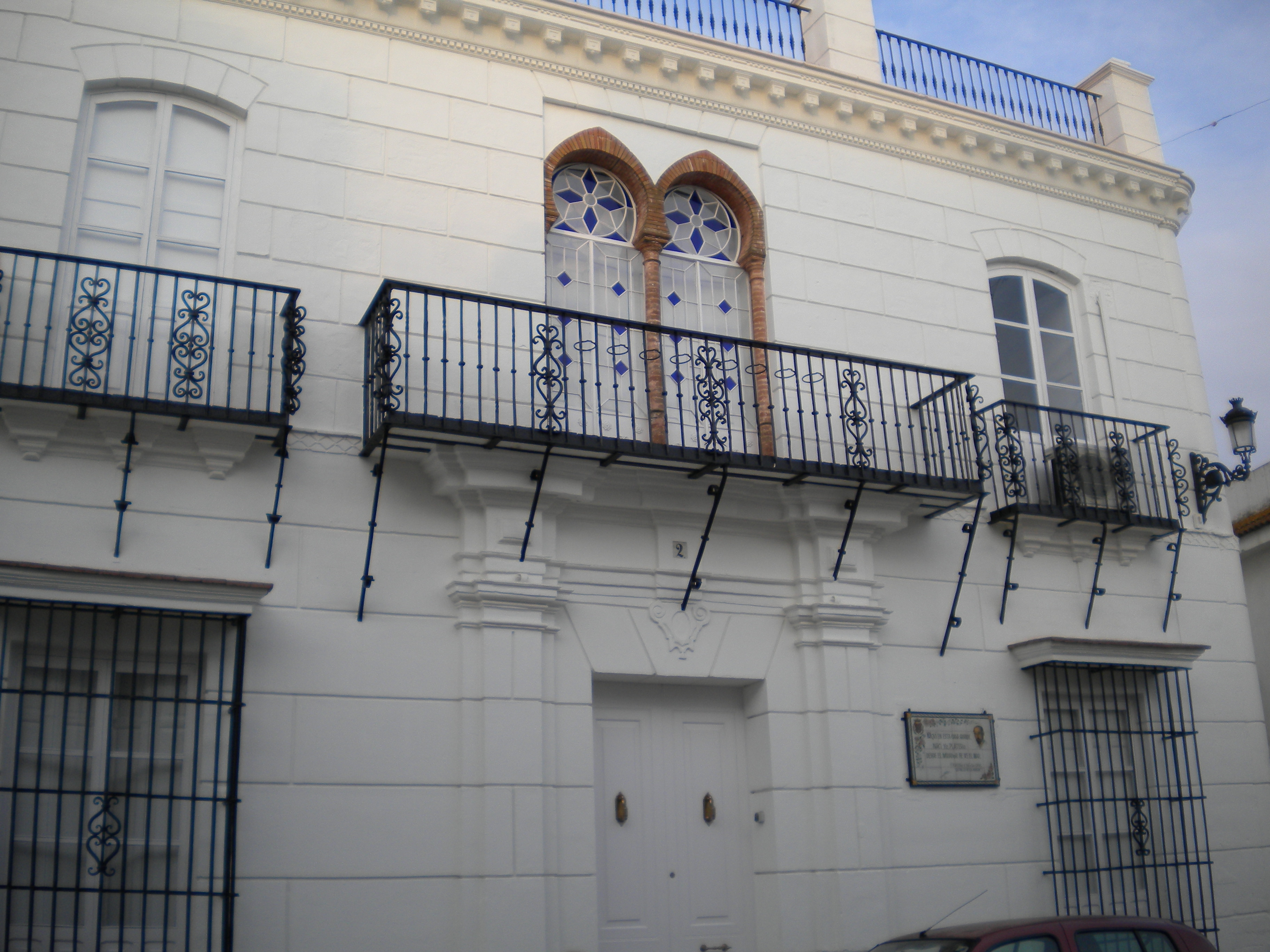 Vista de la Casa Natal de Juan Ramón Jiménez. Actual museo. Moguer